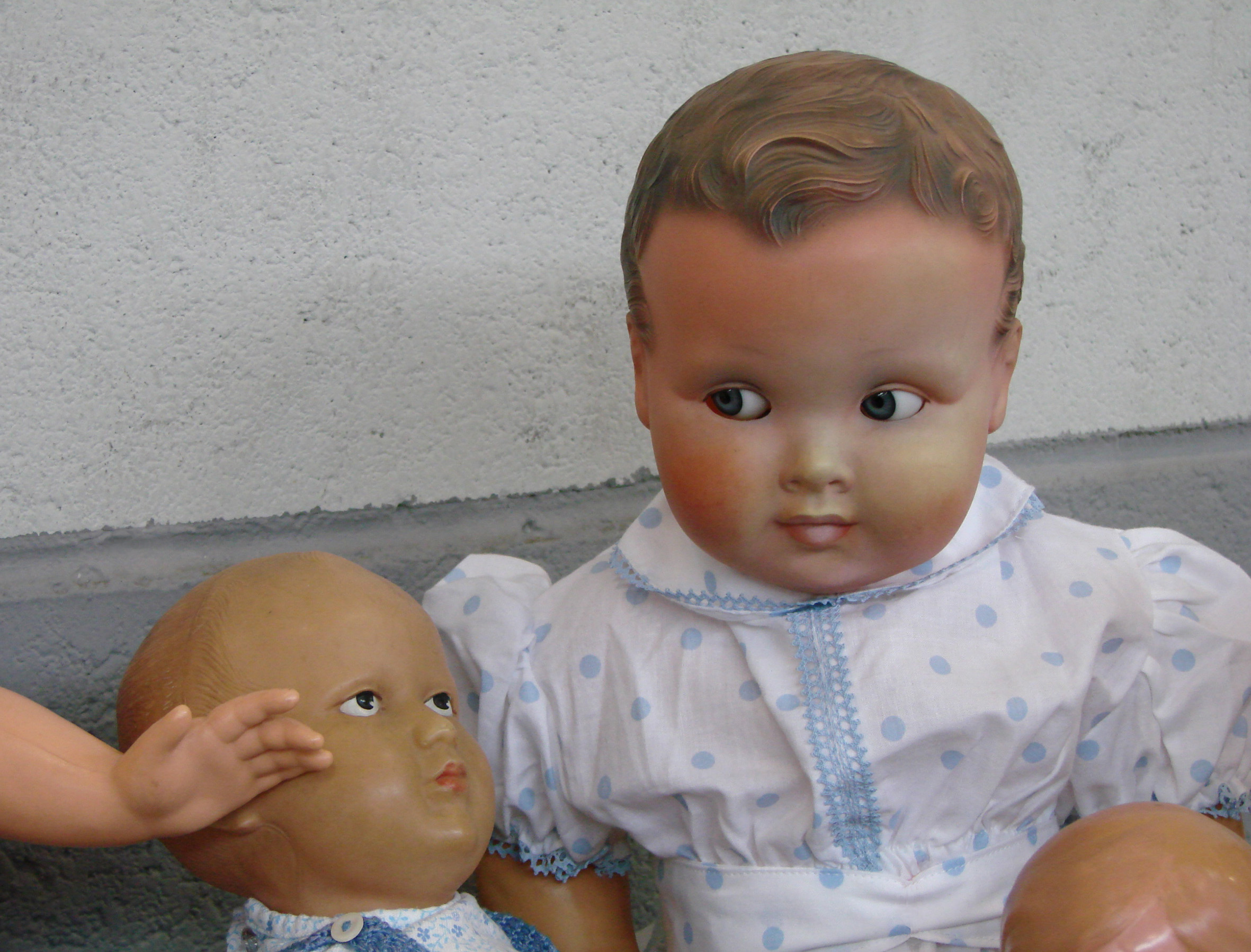 Antique dolls.